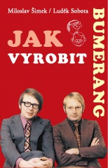 Obal knihy z nakladatelství XYZ, kterou doprovázel Petr Chytil svými ilustracemi.